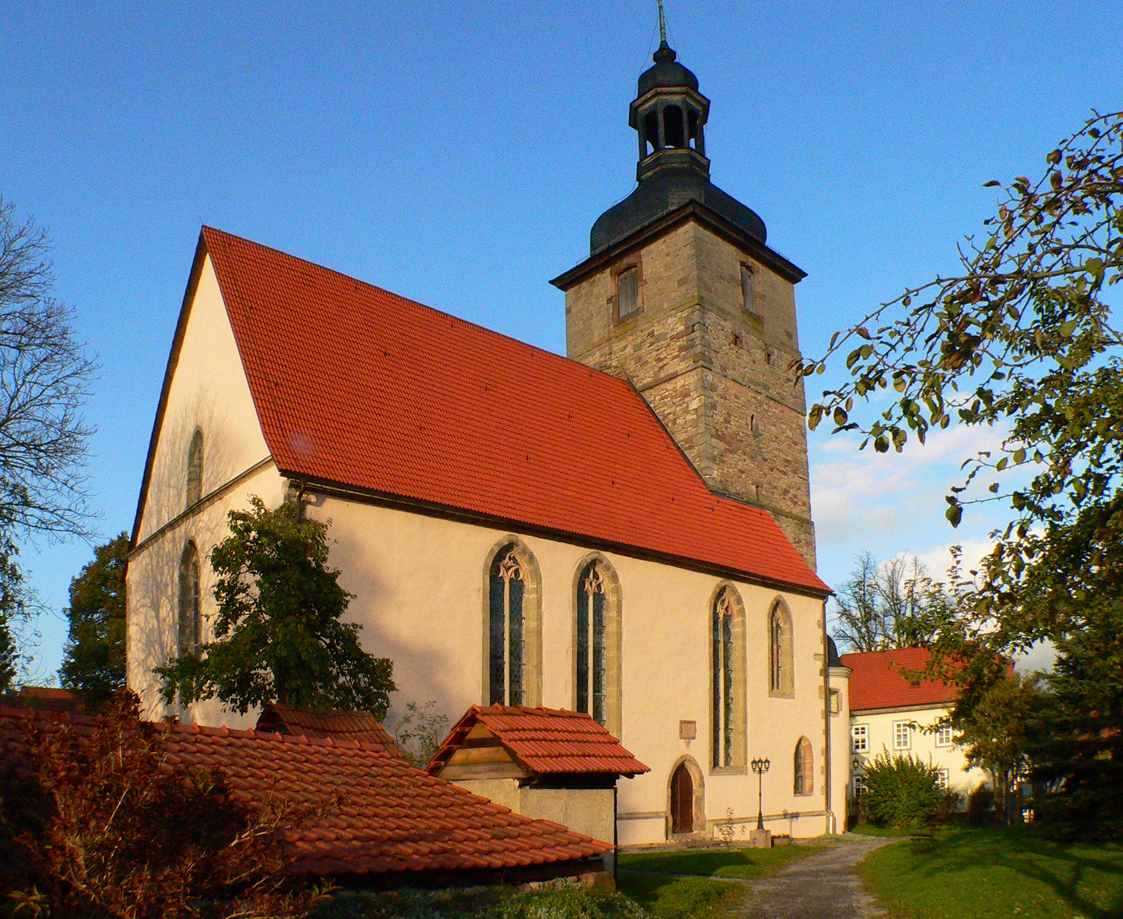 Pfarrkirche St. Johann in Herpf bei Meiningen (Thüringen)